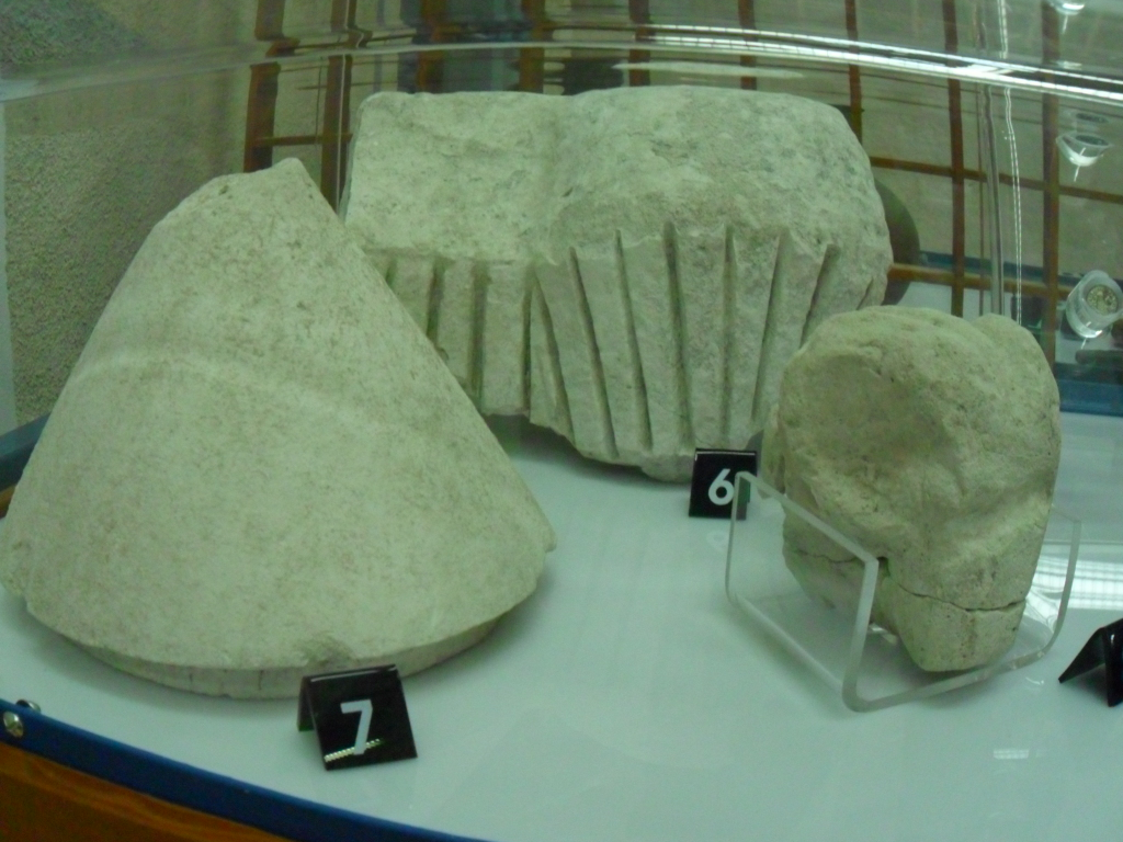 pozzo sacro Irru, civiltà nuragica, scultura, Nulvi Unknown